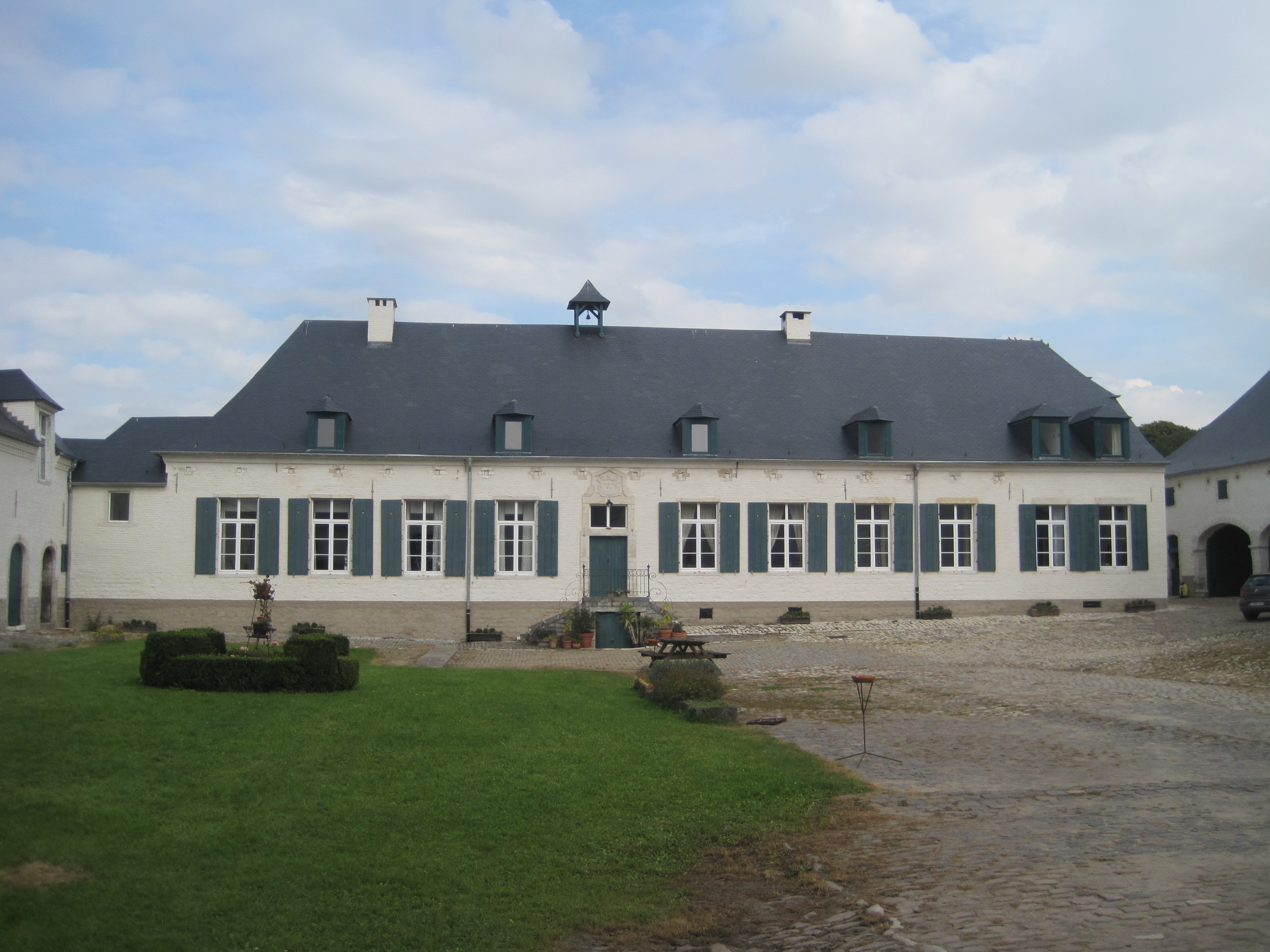 Les façades et toitures de tous les bâtiment de la ferme de Wahenges ainsi que le pavé de la cour, la charpente de la grange, la structure et charpente de la remise, les voûtes et la charpente du corps de logis, la L'église et son autel annexée au logis ainsi que le papier peint couvrant les murs de la deuxième pièce à droite de l'entrée du corps de logis #M# et l'ensemble formé par la ferme de Wahenges, l'étang et le ruisseau Schoor Broekbeek, les chemins pavés menant à la ferme, les alignement de peupliers, le Leckbosch contenant l'emplacement de deux tombelles et de la villa gallo-romaine, les prés et les bois #S#